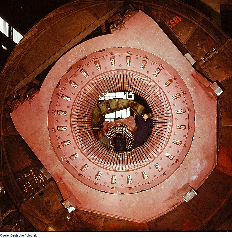 Original image description from the Deutsche FotothekElektromaschinenbauer